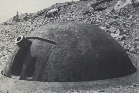 österreichisch-ungarische Panzerhaubitzkuppel 1. Weltkrieg